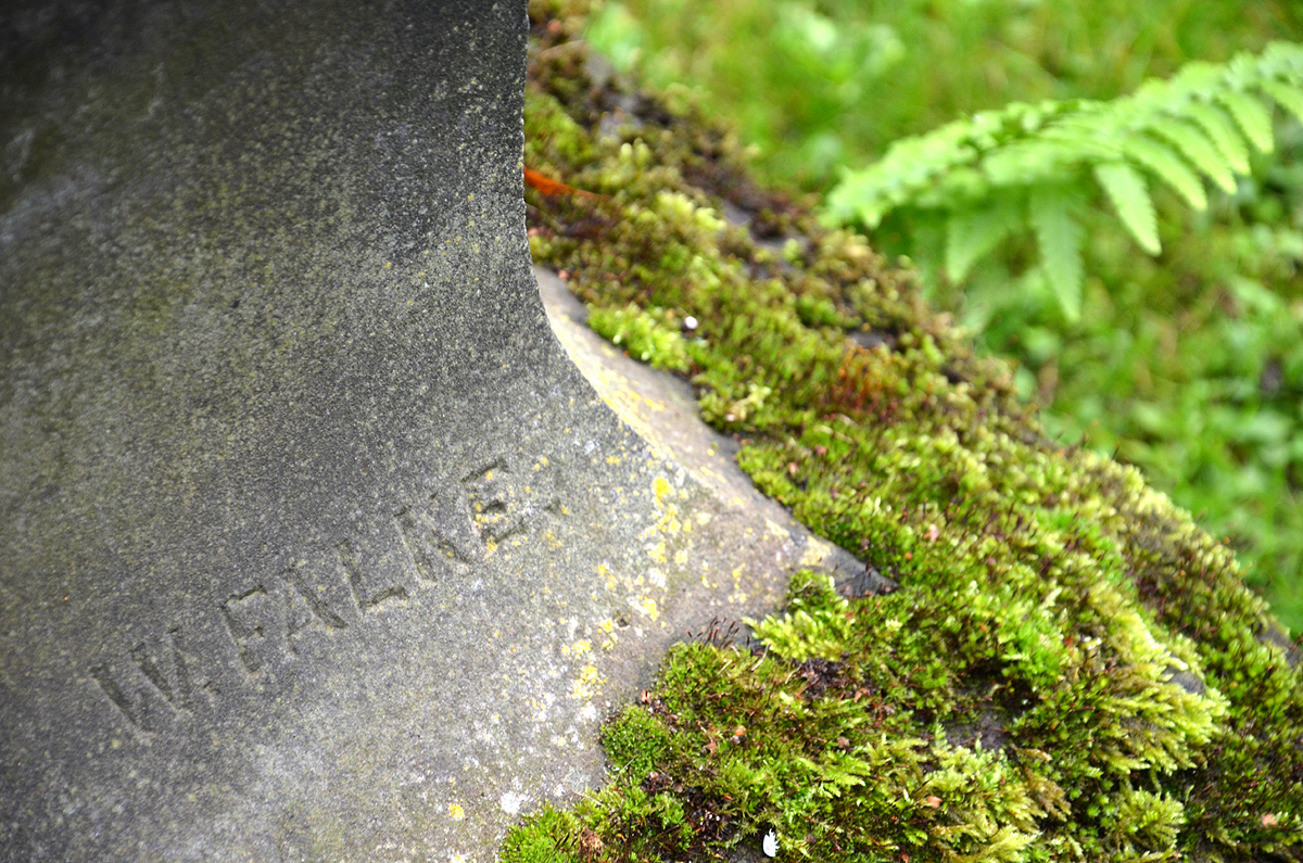 Inschrift W. Falke am Sockelfuß des Grabmals von Leopold Spengemann. Die "Bild- und Steinhauerei, Granit- und Marmorwarenfabrik W. Falke" war 1878 und 1881 für ihre Arbeiten "prämiert" worden ...